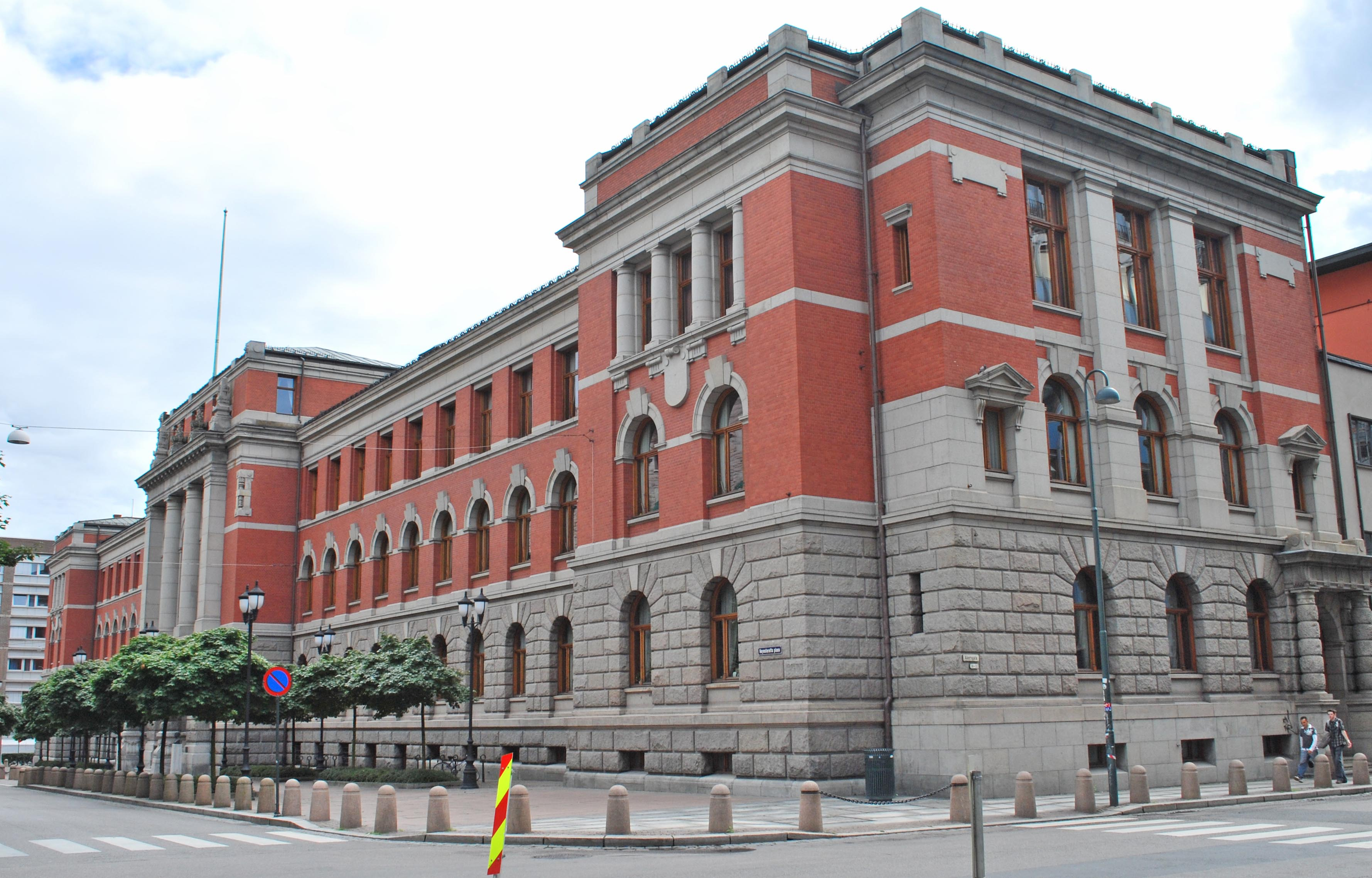 Høyesteretts hus for Norges Høyesterett / Supreme Court of Norway, Høyesteretts plass, Oslo. Ferdig 1903.